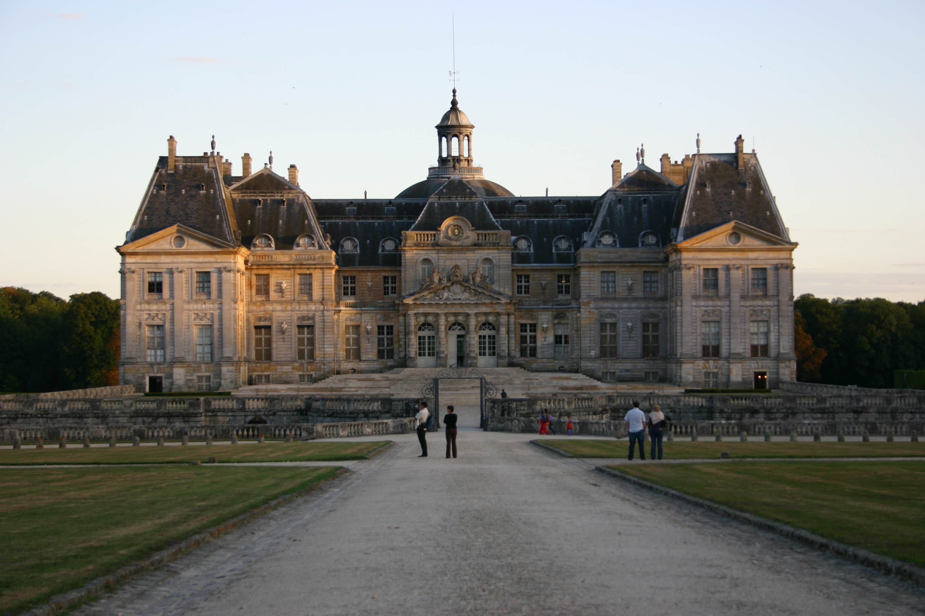 Château de Vaux-le-Vicomte, septembre 2005